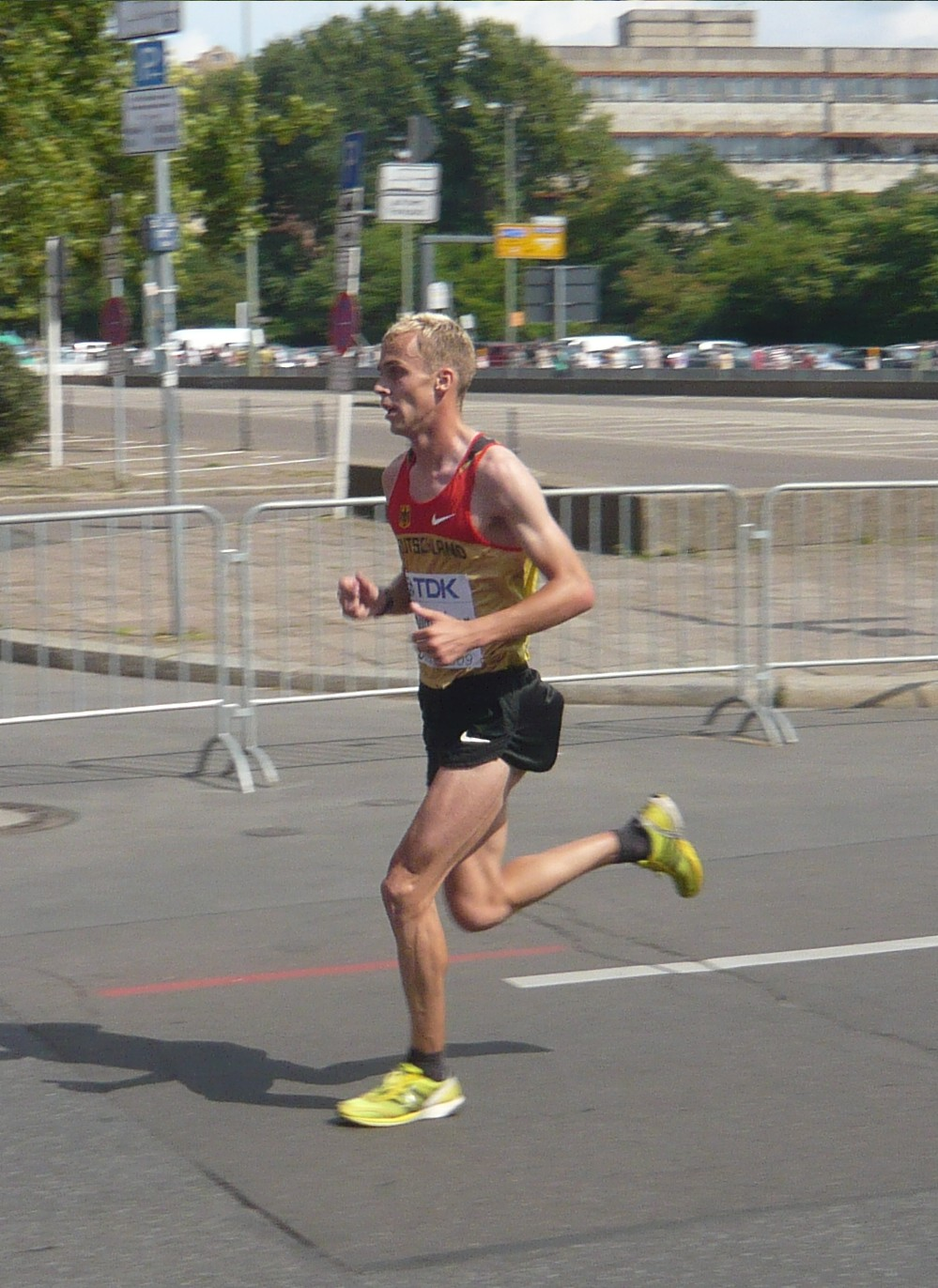 Leichtathletik Weltmeisterschaft, Berlin 2009, Marathon der Herren, der Deutsche André Pollmächer am Kilometer 40, am Ende mit 2:15:36 Platz 18.